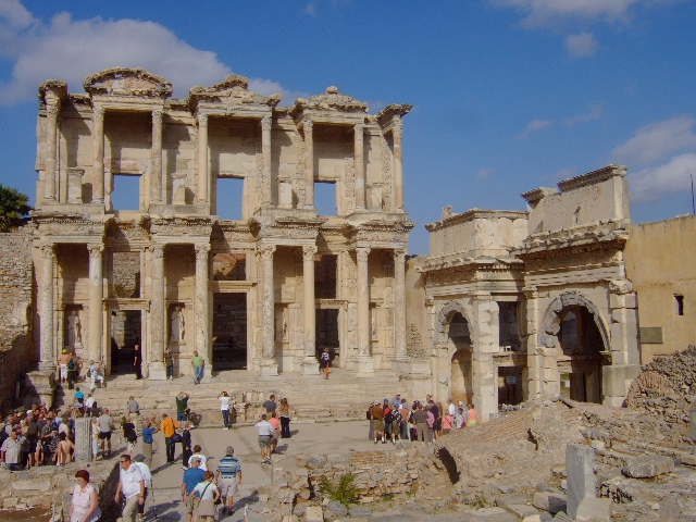 Ephesos: Celsus-Bibliothek und Tor zur Agora